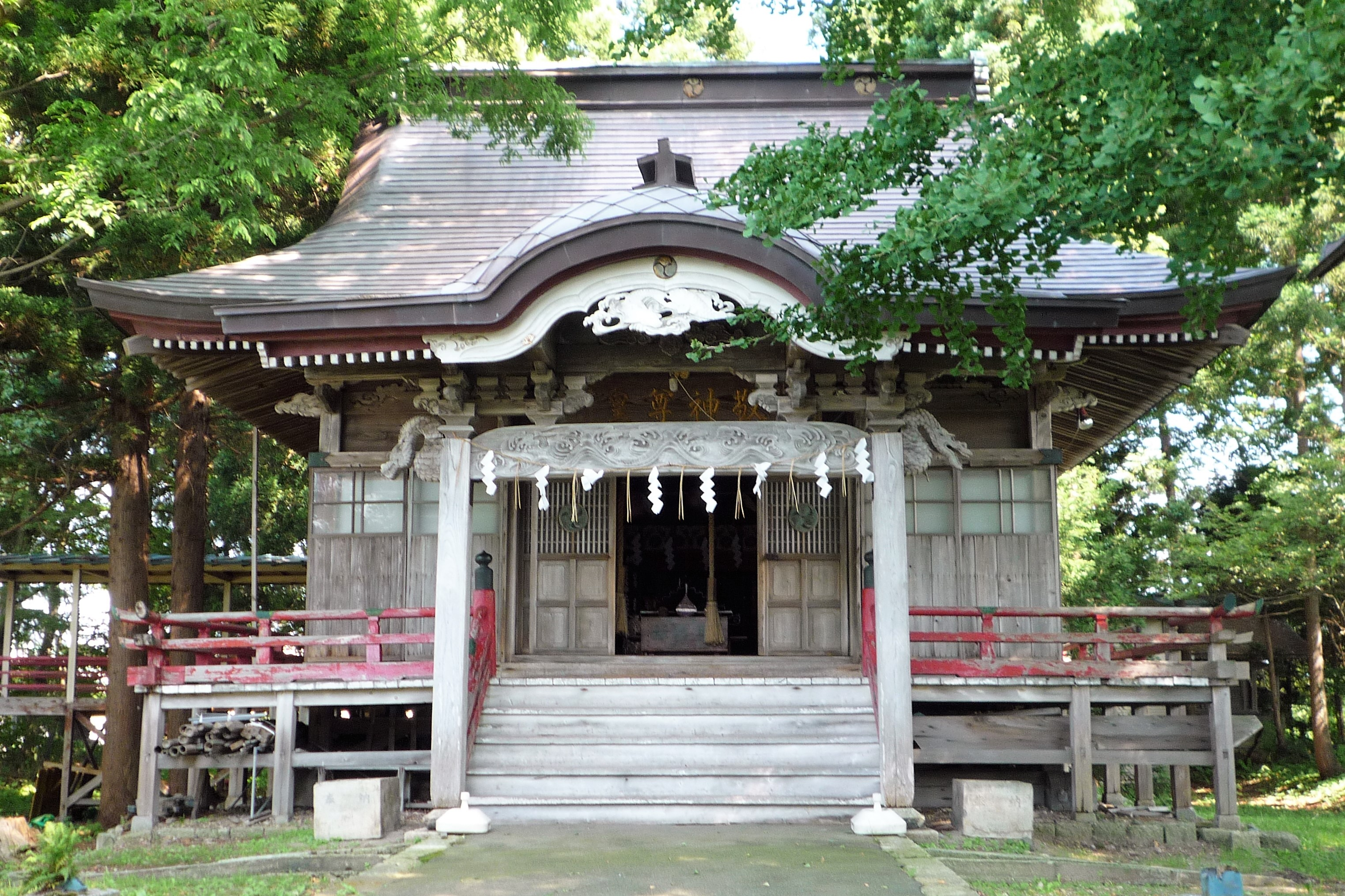 鷹巣神社（ 北秋田市）